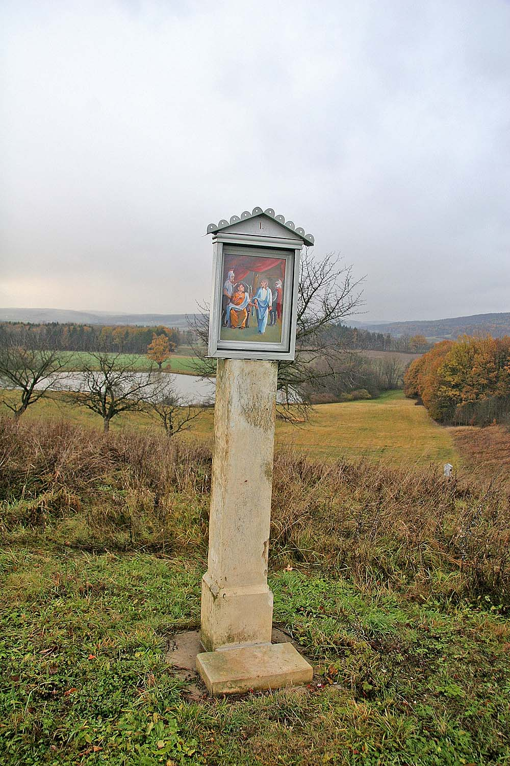 Jedno ze sloupkových zastavení křížové cesty u románského kostela Sv. Petra a Pavla na místě zaniklé vesnice Byšičky u Lázní Bělohrad (k. ú. Brtev, město Lázně Bělohrad) autor: Zp